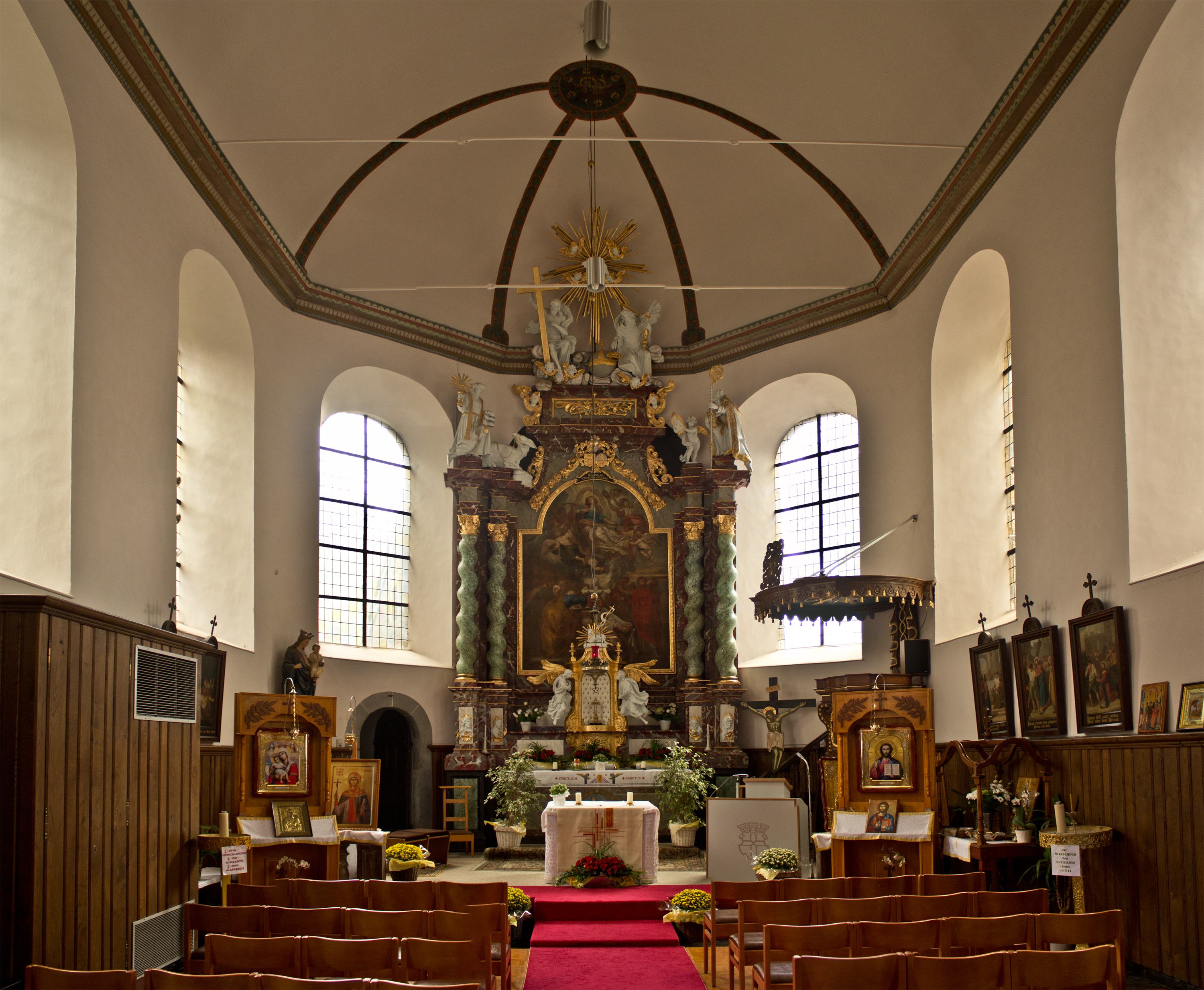 St. Lambertus Kapelle, Eupen.